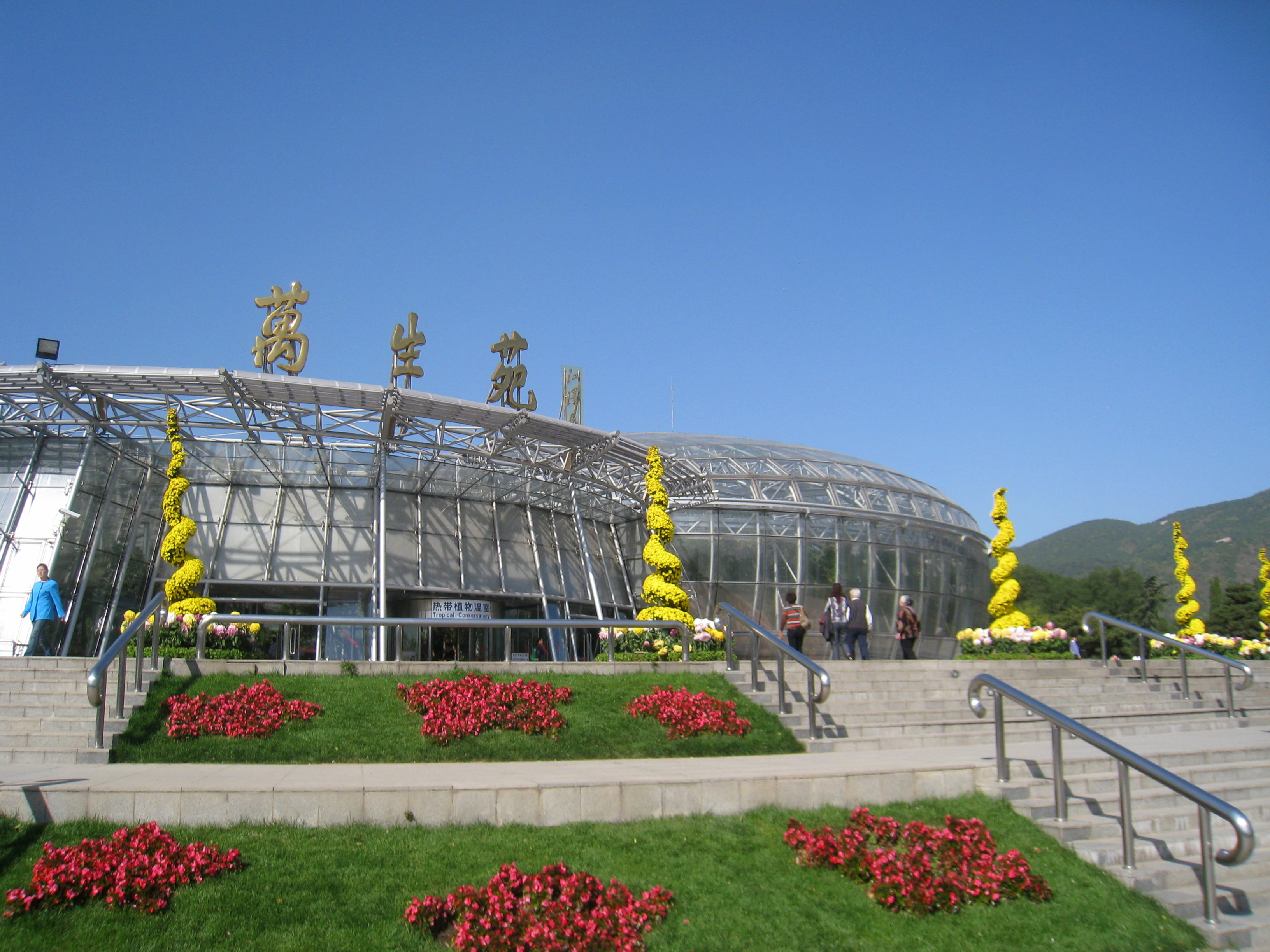 Beijing Botanical Garden (北京植物园), Beijing, China.